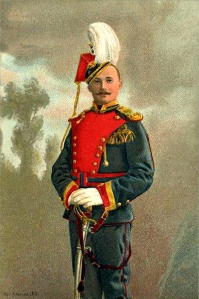 Soldats de la garde IMPERIALE.